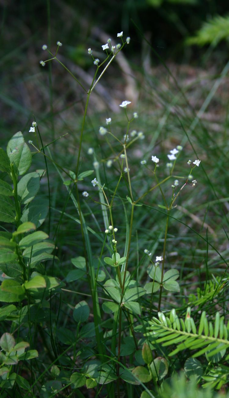 Rundblatt-Labkraut (Galium rotundifolium), Kaffeegewächse (Rubiaceae) - Österreich/Austria/Autriche: Oberösterreich, Hausruckviertel, ca. 2.6 km NE Forsthaus Redltal, ca. 670 m s.m.